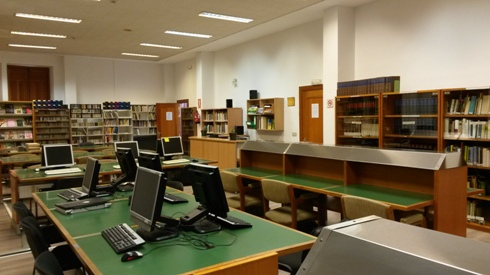 Biblioteca del Conservatorio Superior de Musica Eduardo Martínez Torner